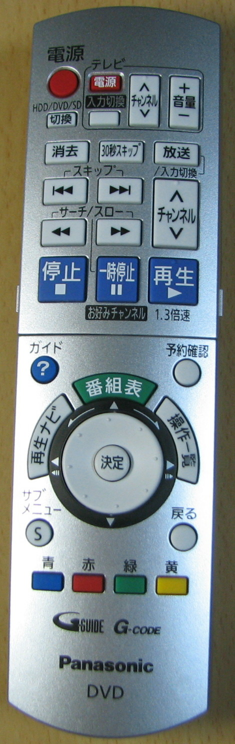 パナソニックDIGA DVDレコーダーのリモコン